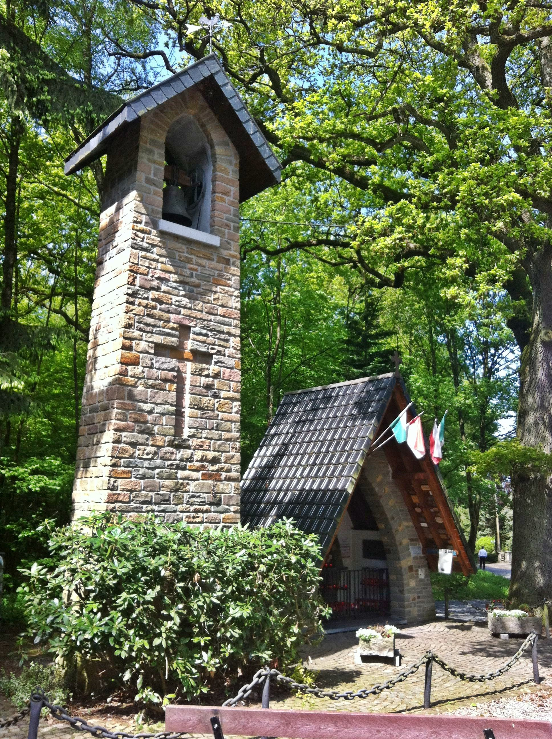 Kapelle Lichtenbusch - Belgien